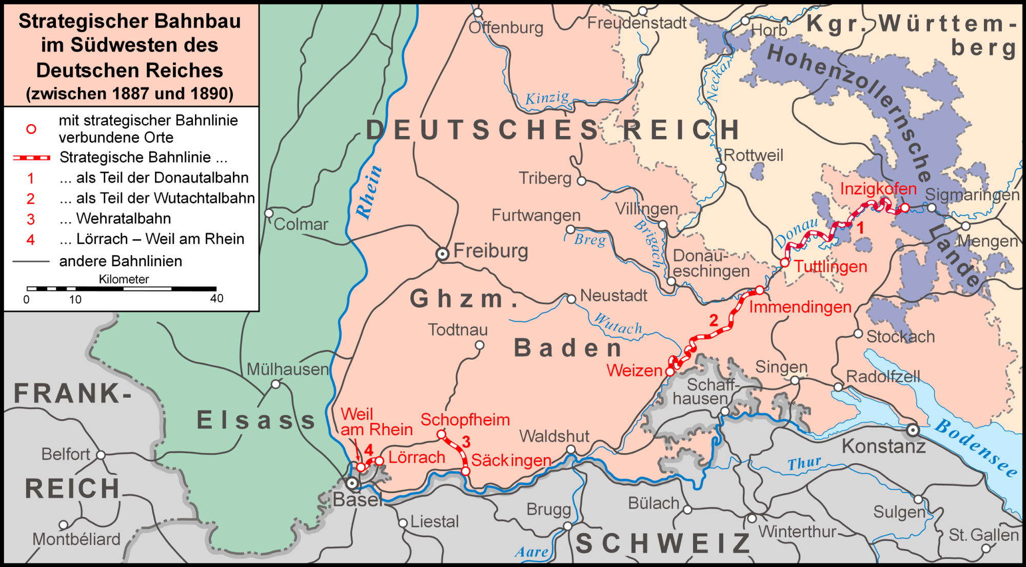 Strategischer Bahnbau in Südbaden und im Donautal